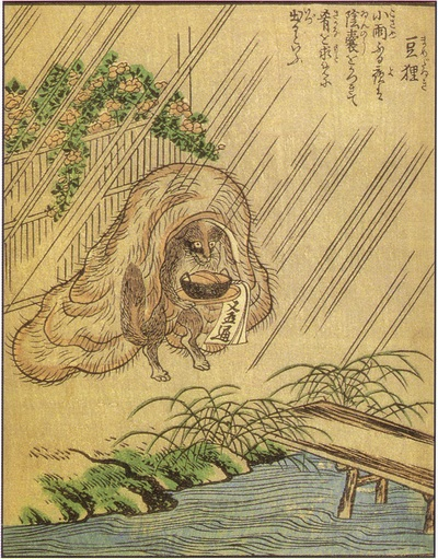 Mamedanuki (豆狸) from the Ehon Hyaku monogatari (絵本百物語)